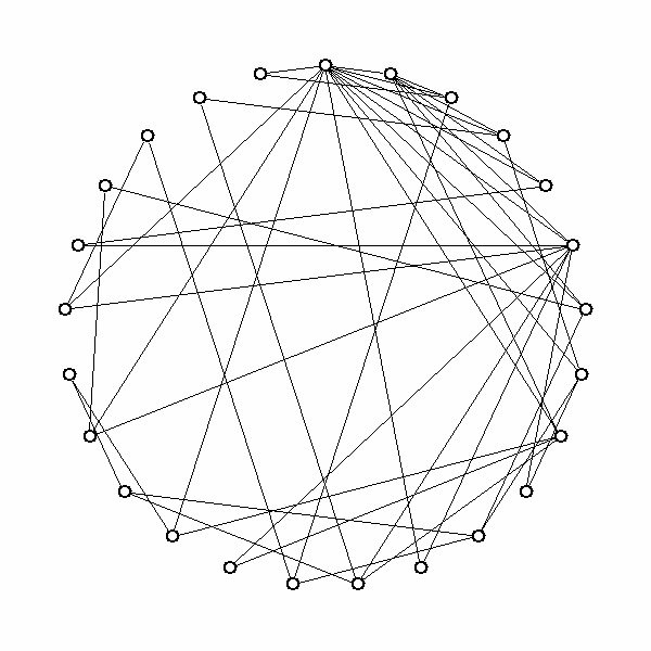 Barabasi-Albert model scale-free graph